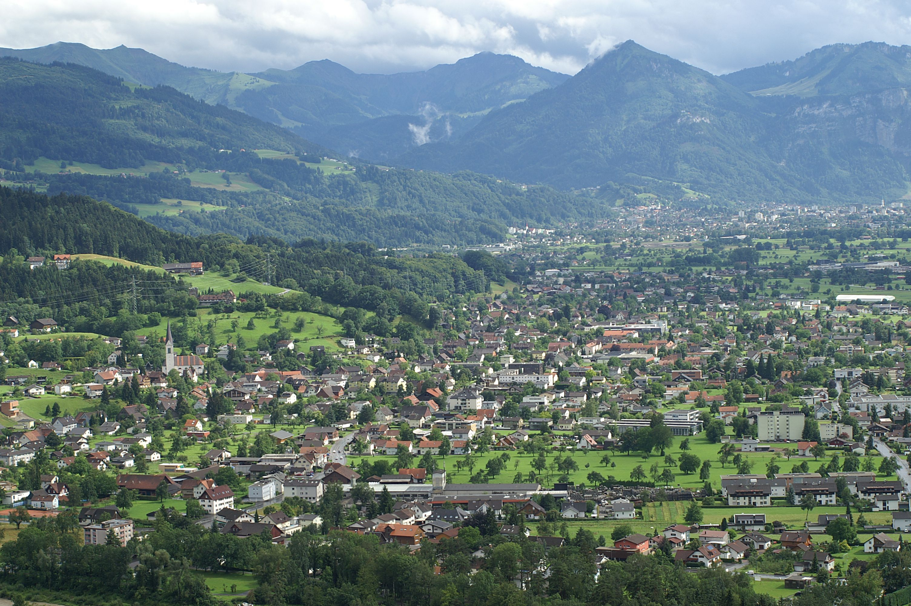 Gemeinde Wolfurt mit Blick auf Schwarzach (Vorarlberg), Dornbirn und die Firstberge. Im Vordergrund einen Ortsteil von Kennelbach sowie die Bregenzerache .